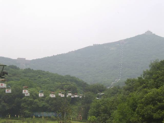 珍珠泉 珍珠泉索道 2004年6月17日撮影 撮影者：権作 参照